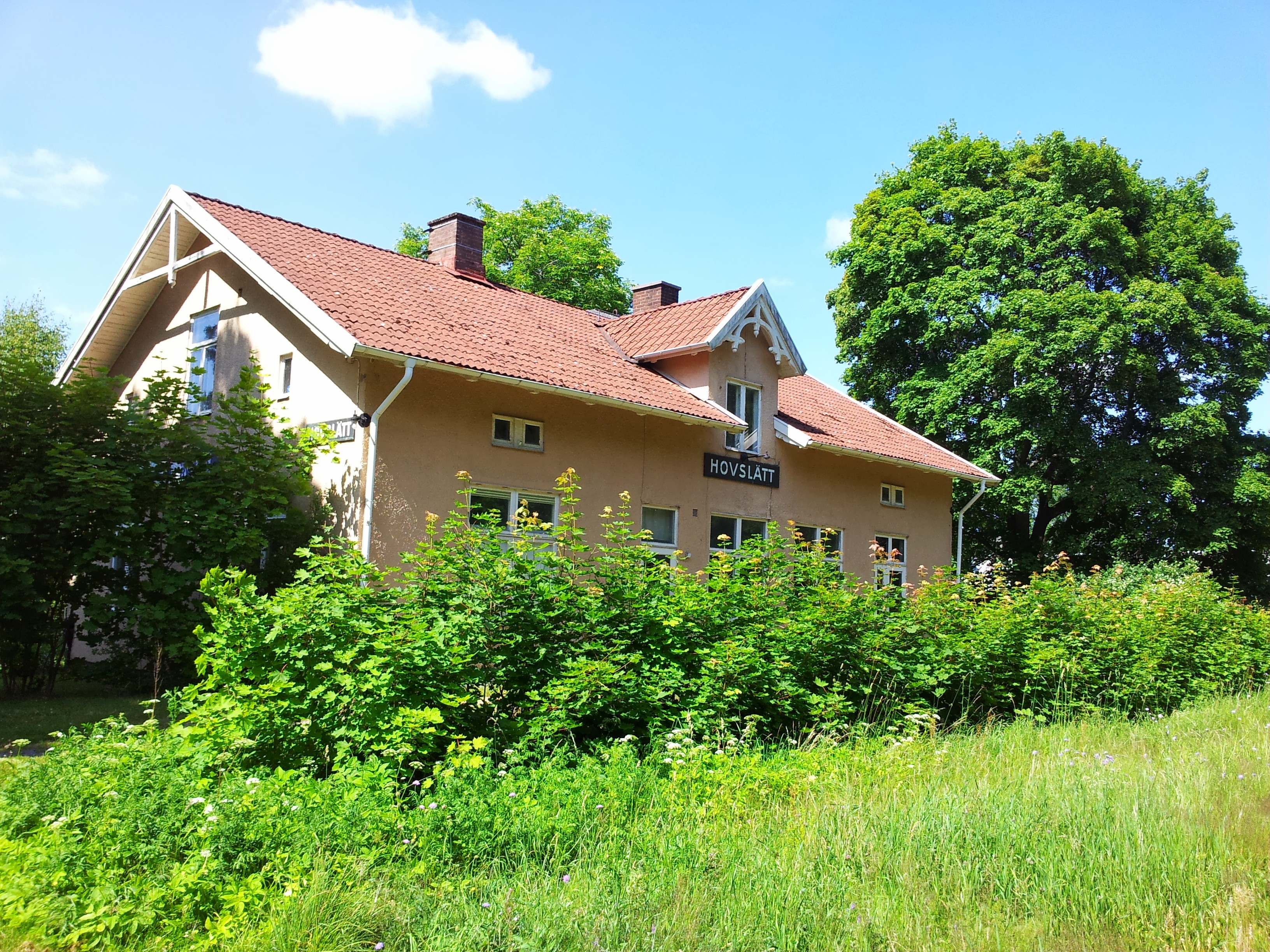 Gamla stationshuset vid Hovslättsstation, juli 2013